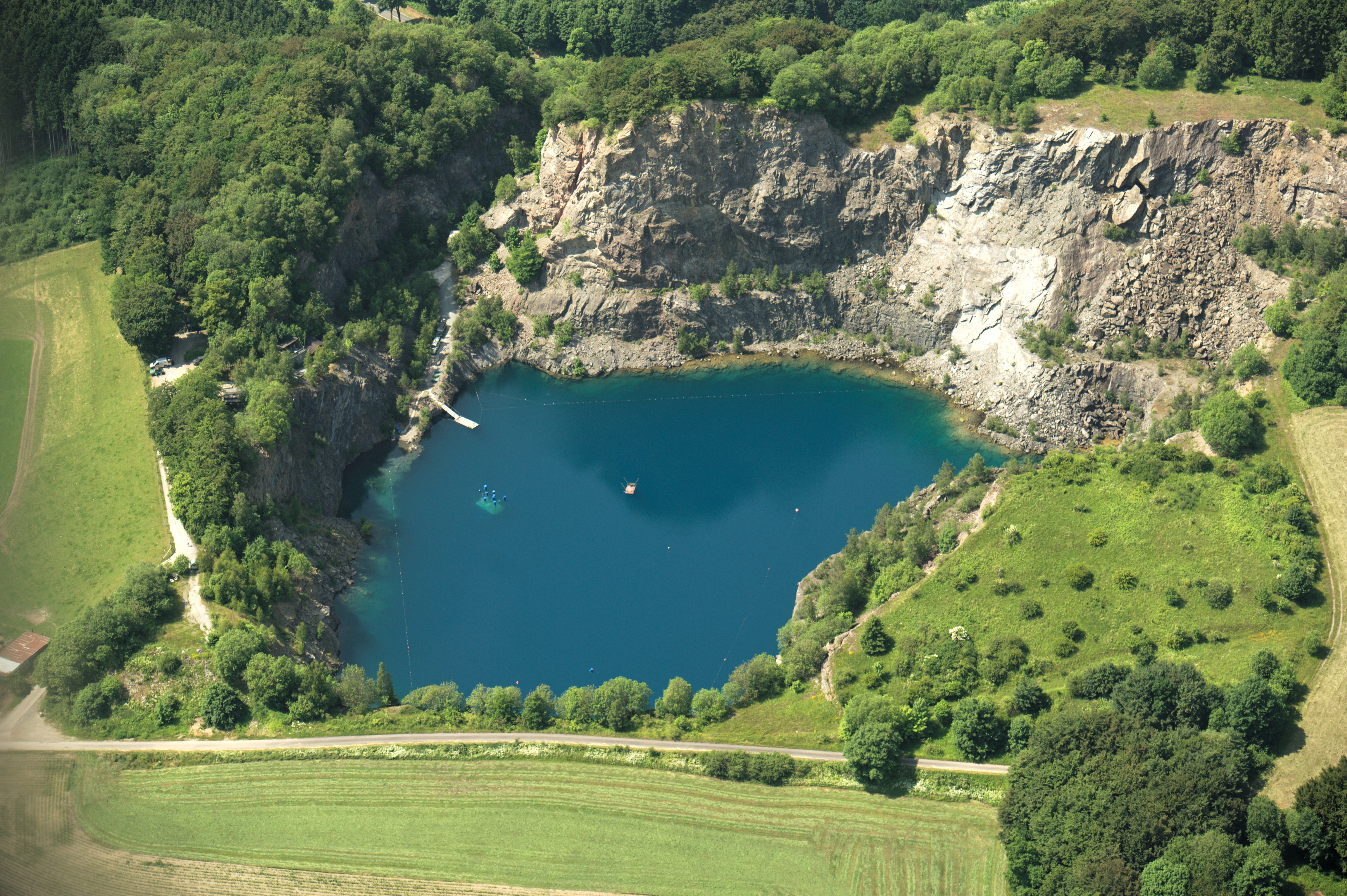 Fotoflug Sauerland-Ost: Steinbruch, Naturschutzgebiet An der Burg (HSK-202), Tauchersee oder Blauer See südwestlich von Brilon-Messinghausen. Am See wird ein Taucherübungsplatz betrieben. Im See kann 44 m tief getaucht werden. The making of this document was supported by the Community-Budget of Wikimedia Germany.